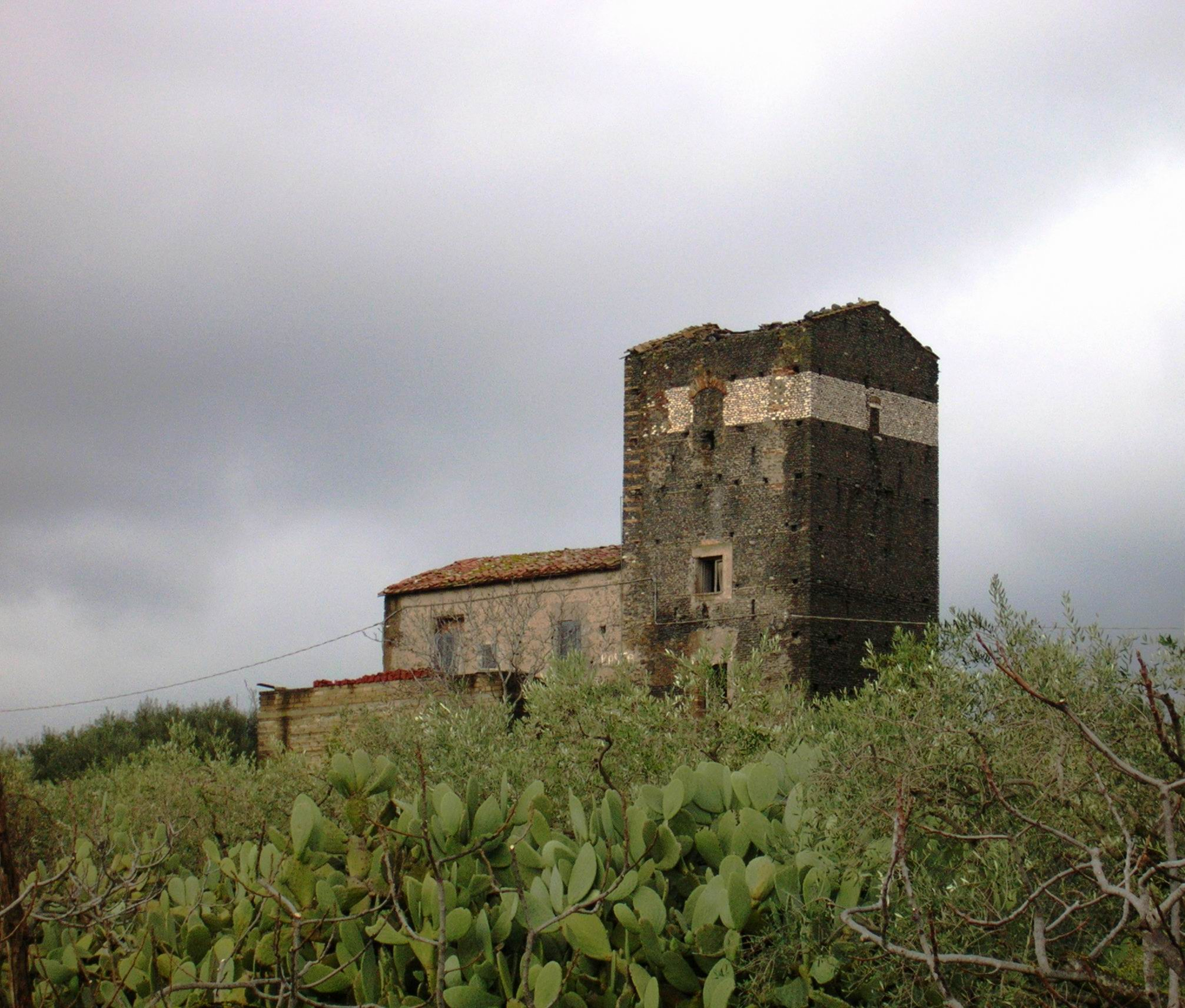 Cecchina di Albano Laziale - Cancelliera - la torre